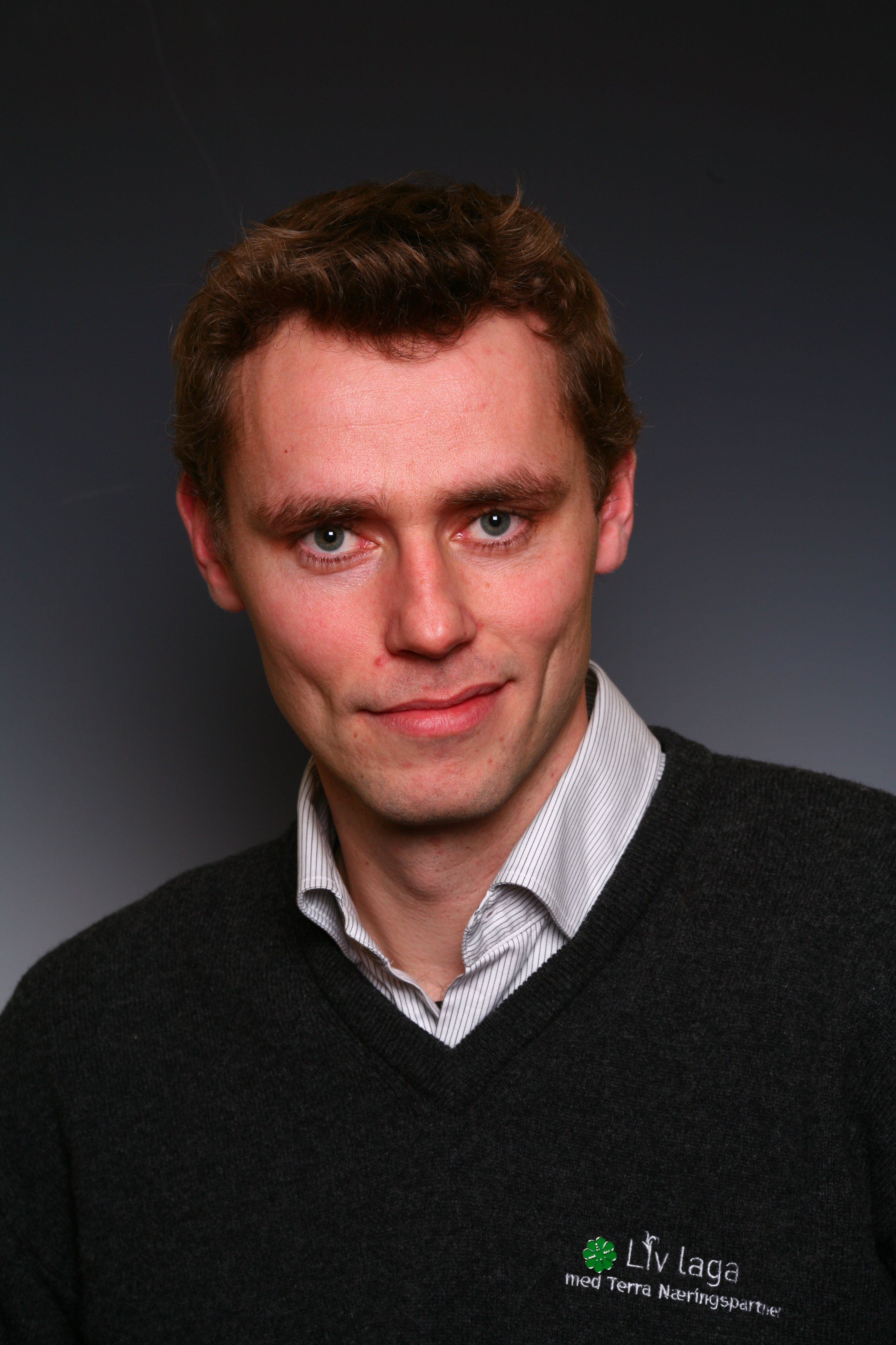 15Sør-Trøndelag, Ola Borten Moe